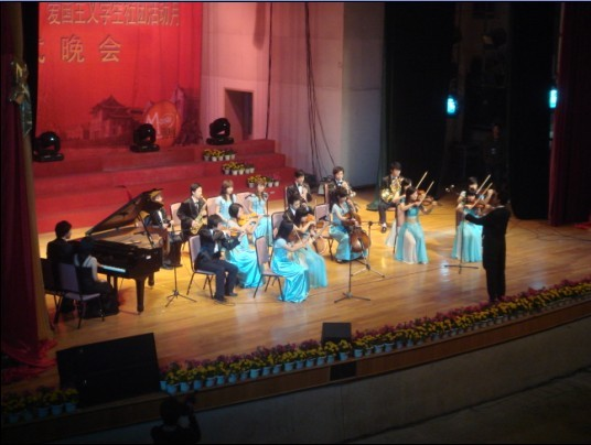 厦门大学建南大礼堂内举办的学生音乐会